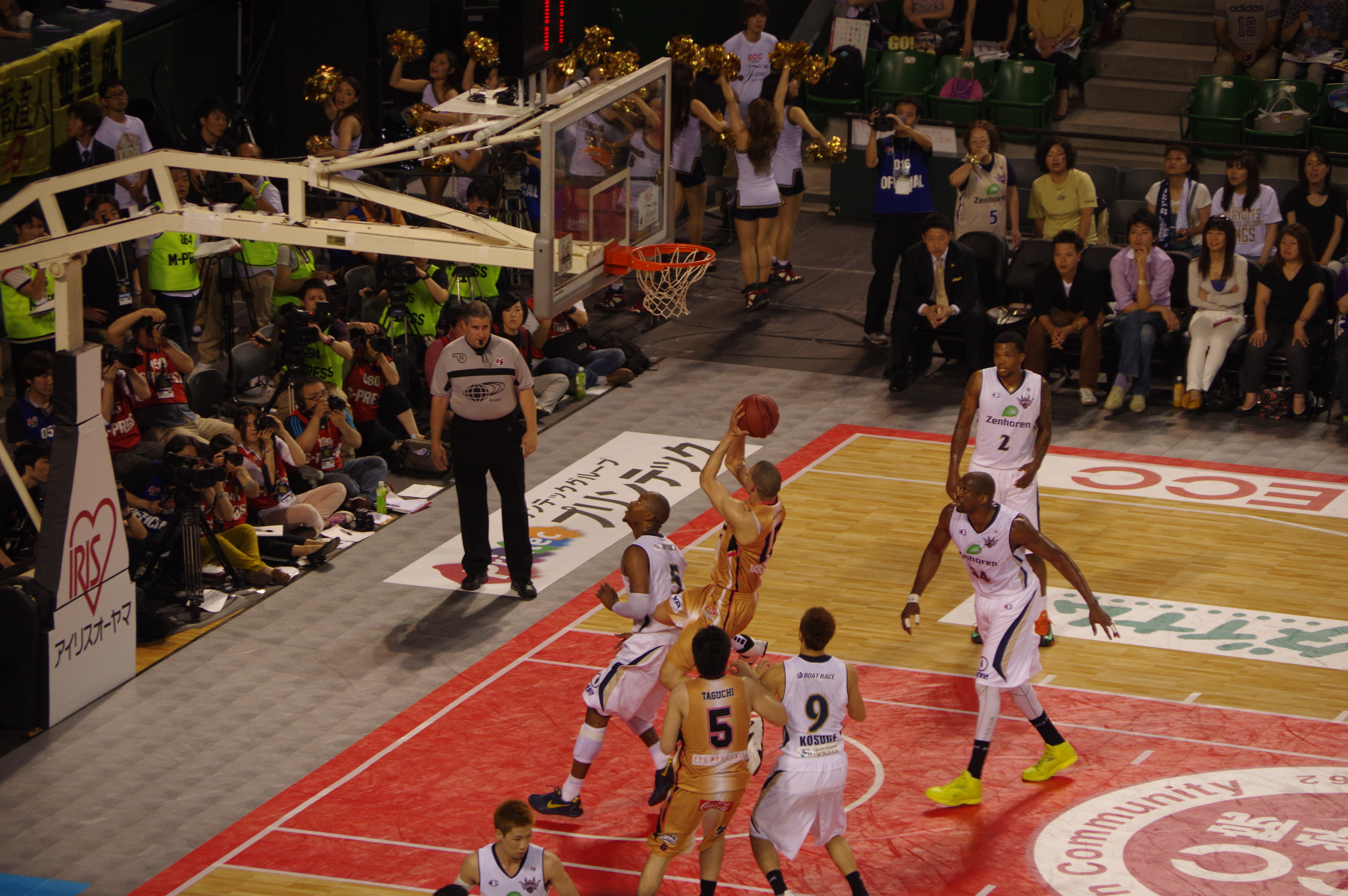 ｂｊリーグ 2013-2014シーズン プレイオフ ファイナルズ_025